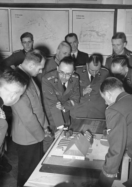 Berlin, Ausstellung "Planung und Aufbau im Osten" Ausstellung "Planung und Aufbau im Osten". Besichtigung durch Rudolf Hess. 1941 Abgebildete Personen: Himmler, Heinrich: Reichsführer der SS, Deutschland (GND 11855123X) Heß, Rudolf: Stellvertreter Hitlers als Führer der NSDAP, Kanzleileiter, Deutschland (GND 11855039X)